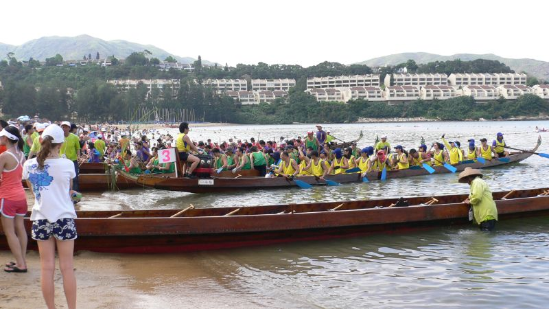 Dragon Boat Race in Discovery Bay, Hong Kong 香港 愉景灣 龍舟競渡